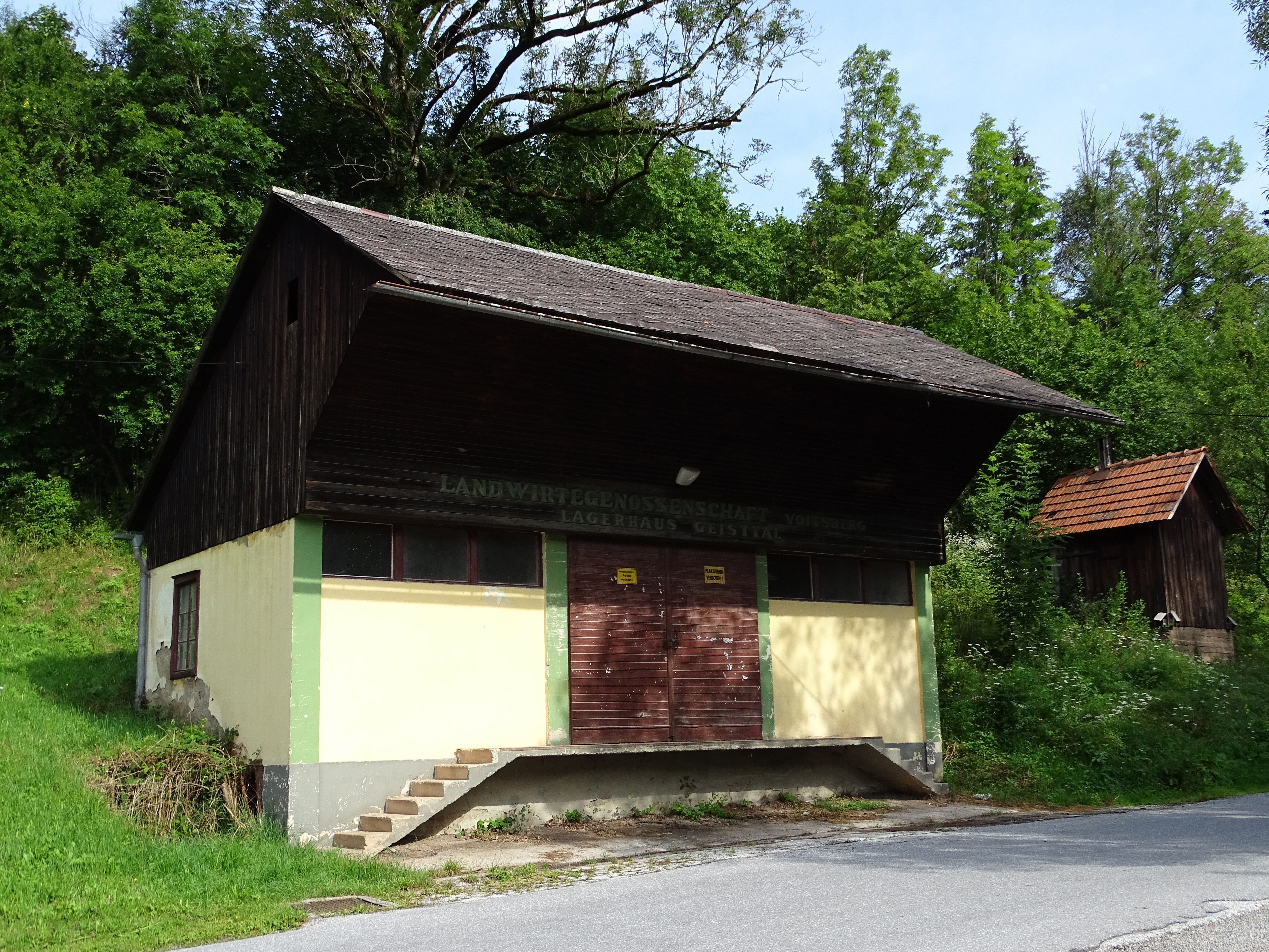 Das Lagerhaus der Landwirtschaftsgenossenschaft Voitsberg in Geistthal in der Gemeinde Geistthal-Södingberg